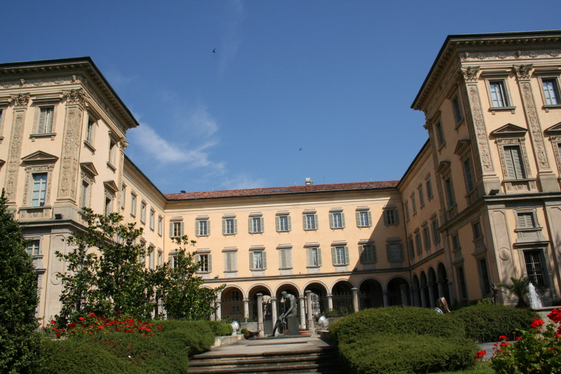 Palazzo del Governo e della Provincia di Bergamo, retro.